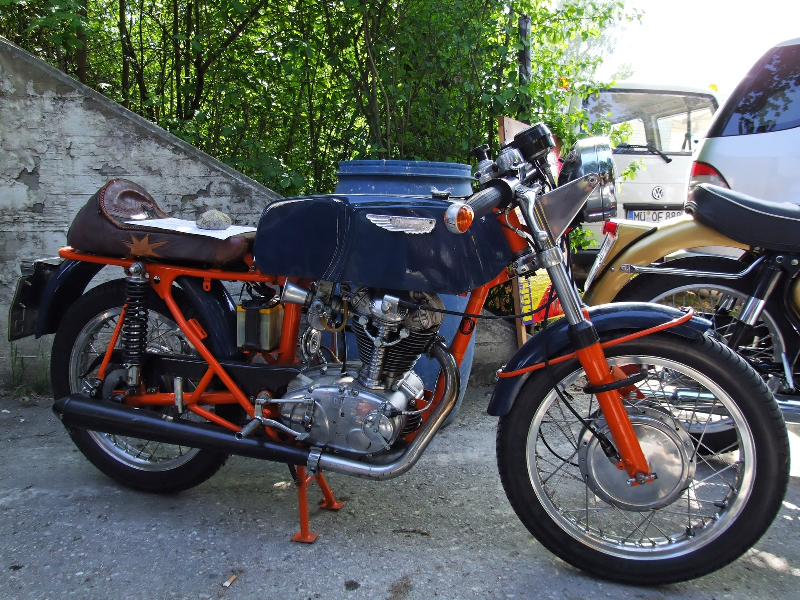 Quelle: selbst fotografiert, 04/2007 Fotograf: Späth Chr. Anmerkung: Auf dem Foto ist eine spanische 250 24 Horas von Mototrans zu sehen